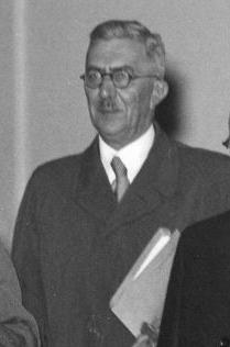 Cornelis van den Bussche (1884-1941), Nederlands politicus